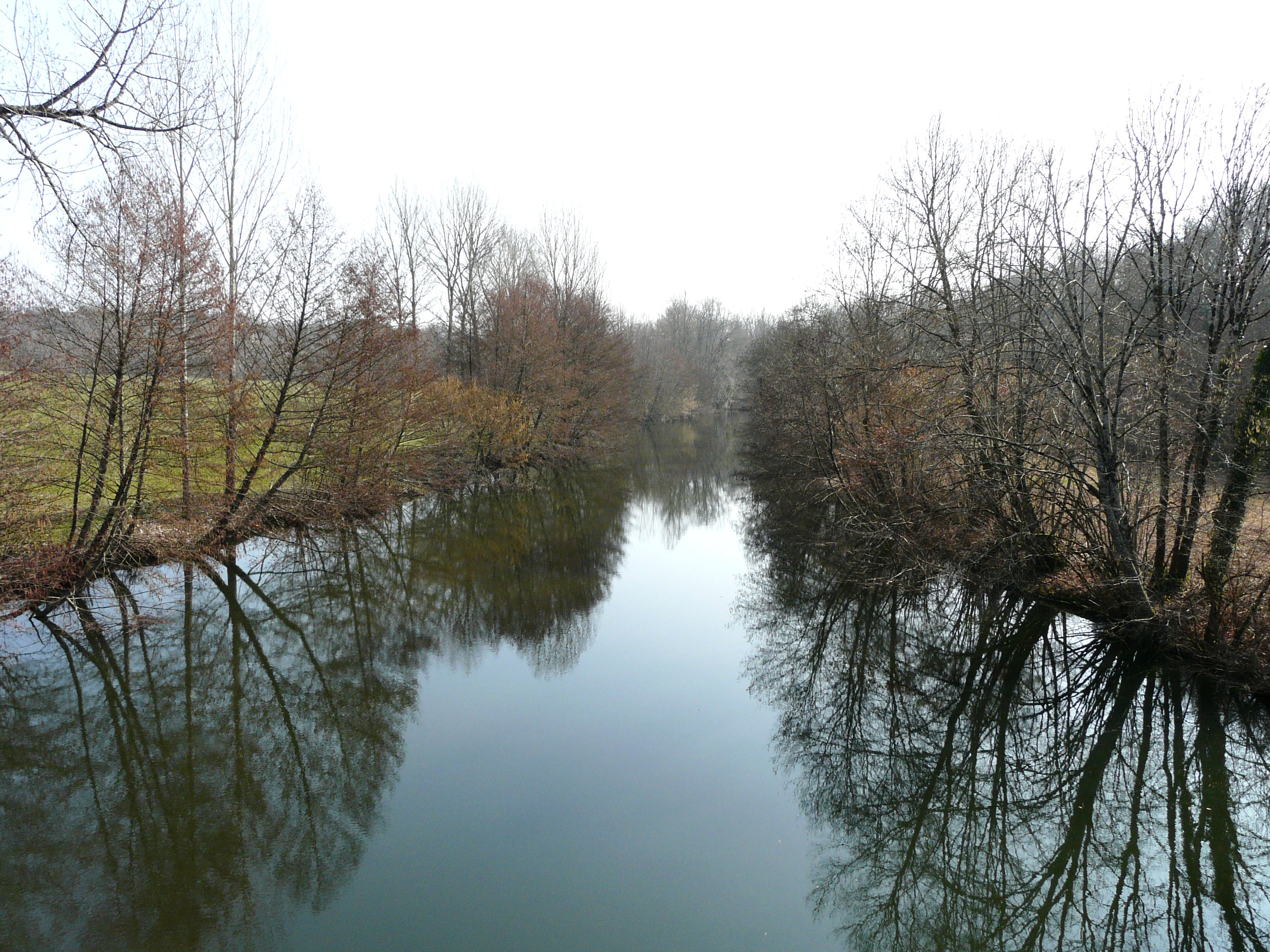 En amont du pont d'Ambon, sur la route départementale 2, la Dronne marque la limite entre Creyssac (à gauche) et Bourdeilles (à droite), Dordogne, France.